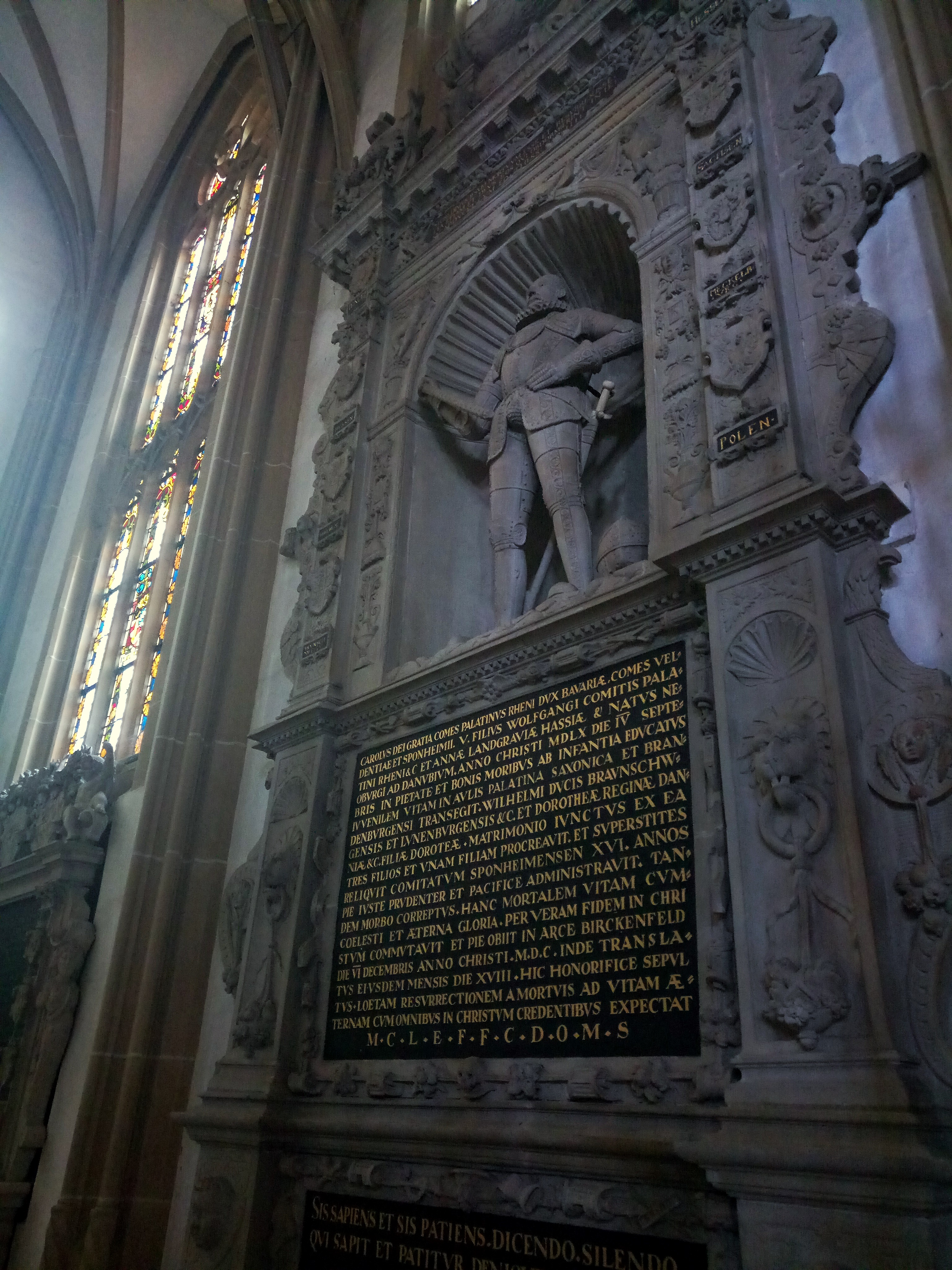 Epitaph Herzog Karl I. (+ 1600), Schlosskirche Meisenheim